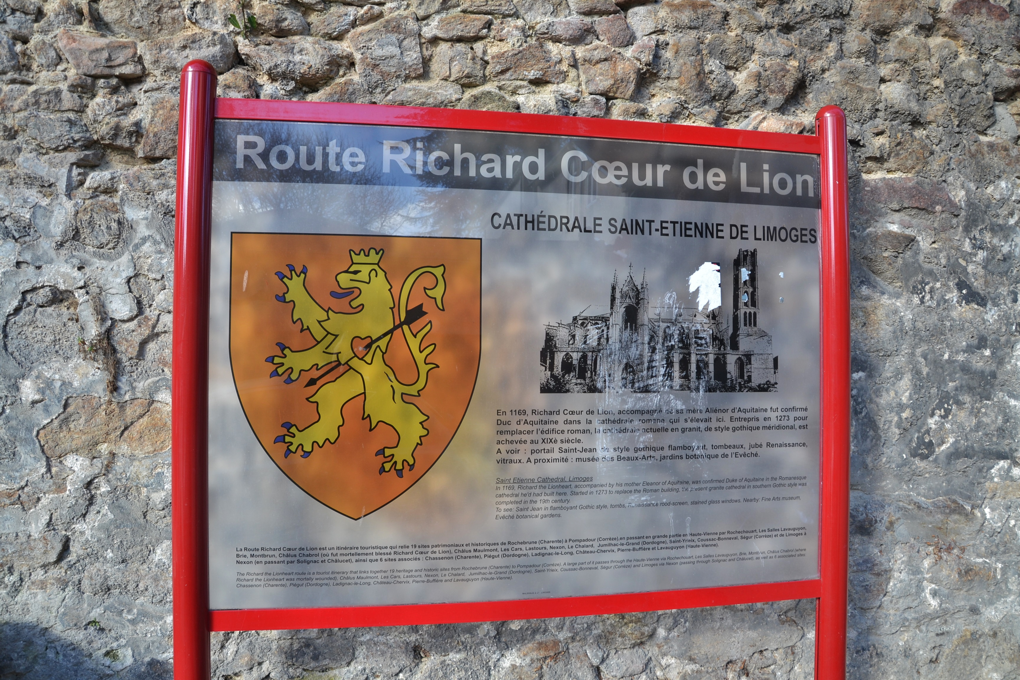 Panneau de la route Richard Cœur-de-Lion à Limoges (Haute-Vienne, France)